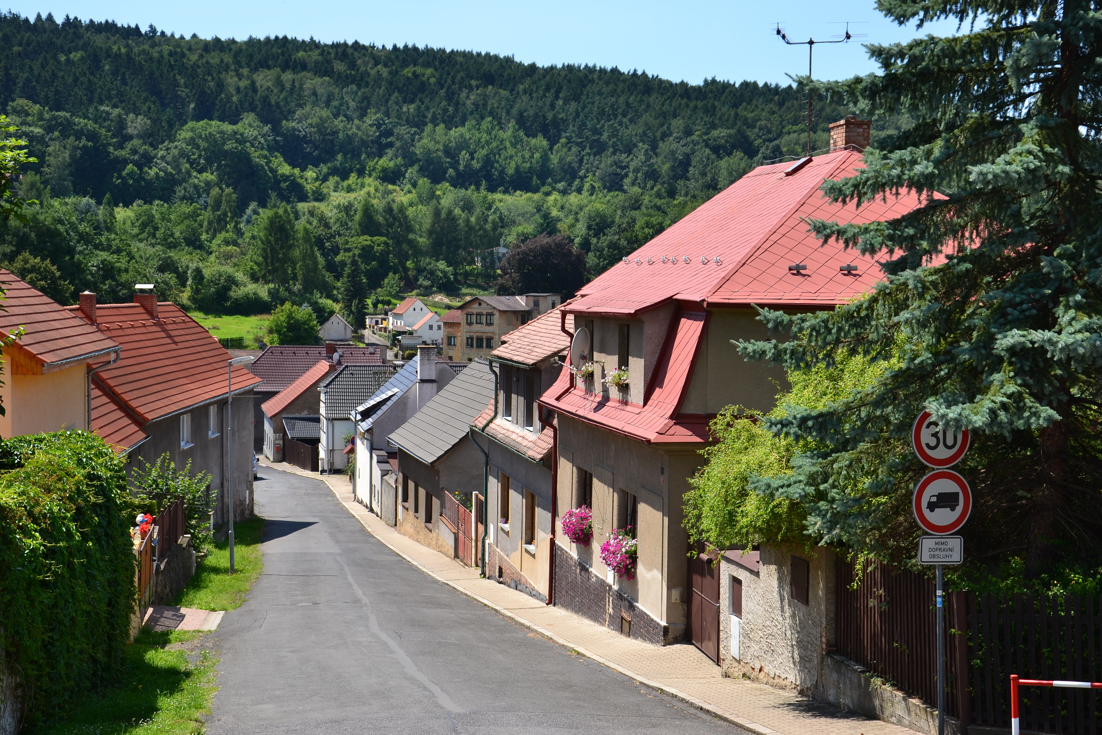 Štrbice